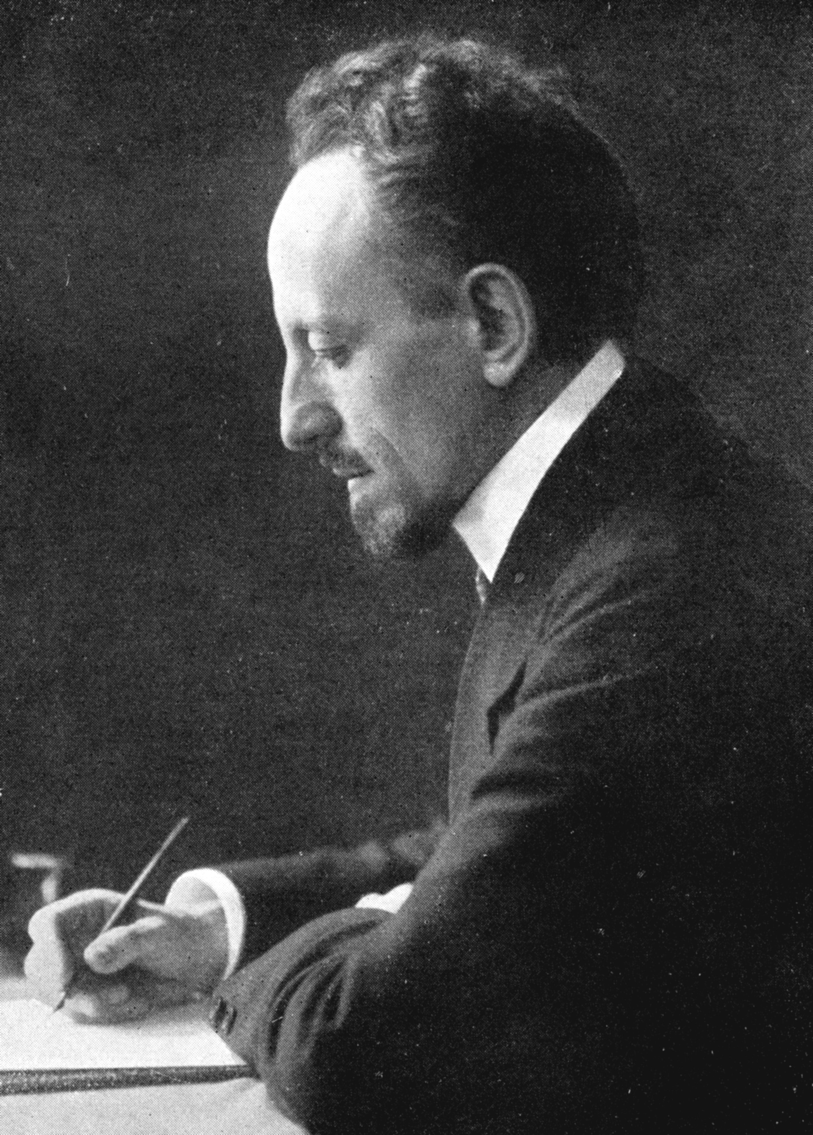 Wilhelm Schlink (Physiker, Ingenieur, Mathematiker)